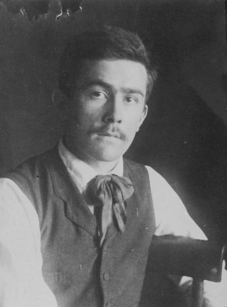 Samuel Murray (circa 1890)